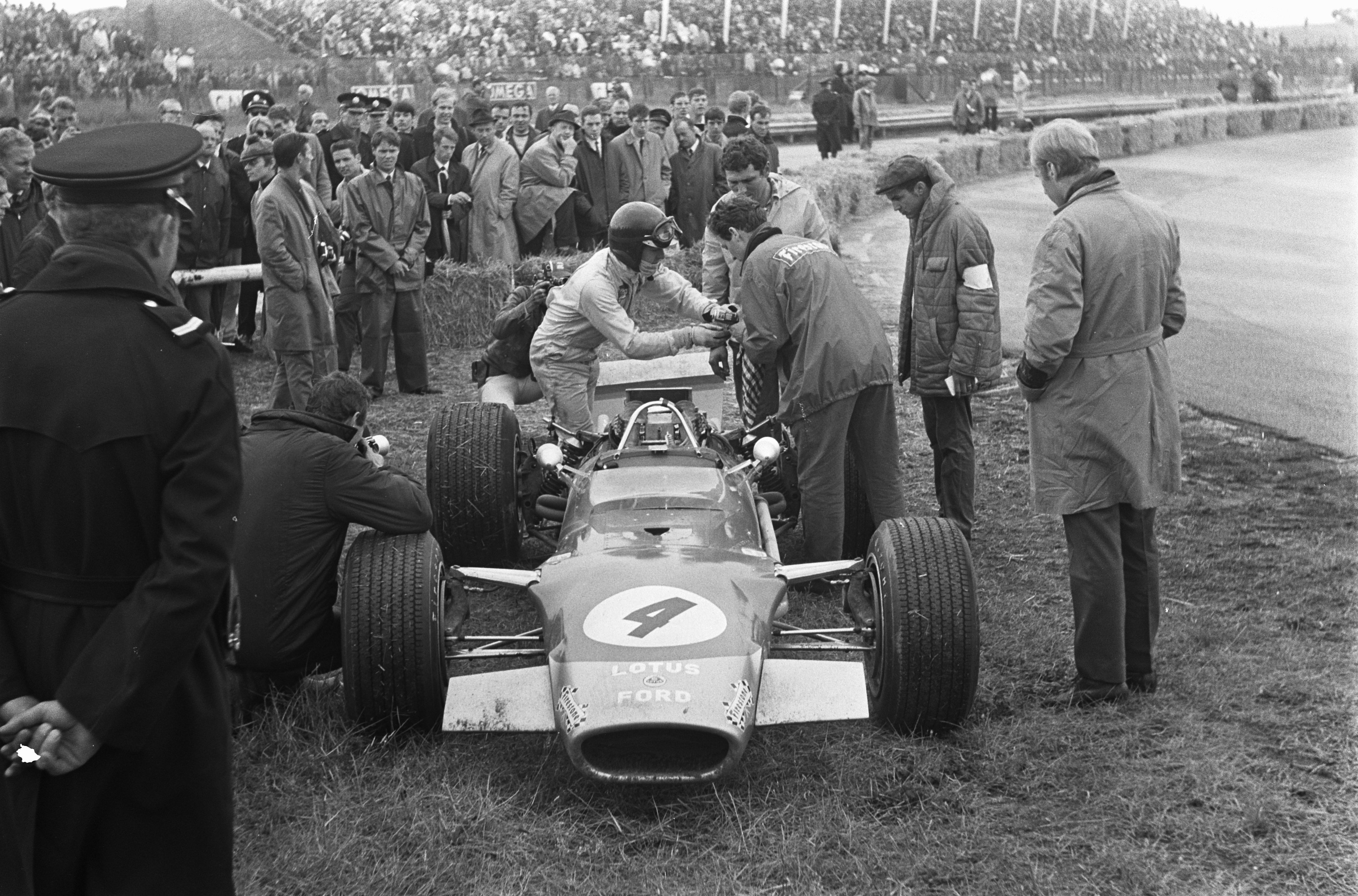 Grand Prix 68 Zandvoort . Jackie Oliver in de pits.